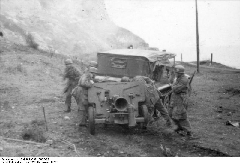 San Felice (Monte Circeo).- Besichtigung des Abschnitt Süd durch KG [kommandierenden General] Information added by Wikimedia users.Das Foto zeigt ein 10,5cm Leichtgeschütz 40.